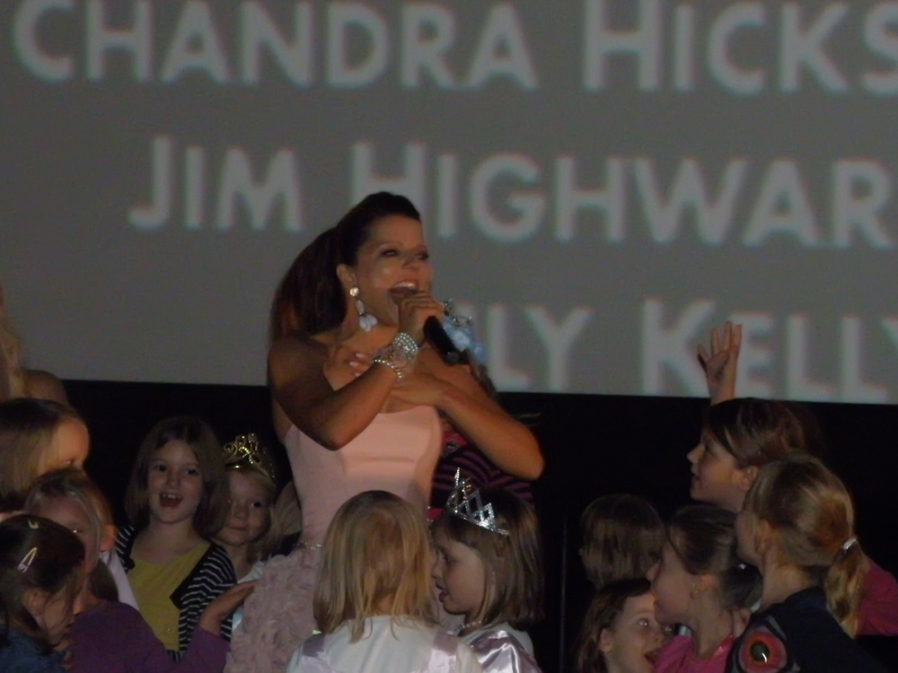 Multikino Złote Tarasy, Warszawa, premierowy pokaz filmu „Barbie Księżniczka i Piosenkarka”